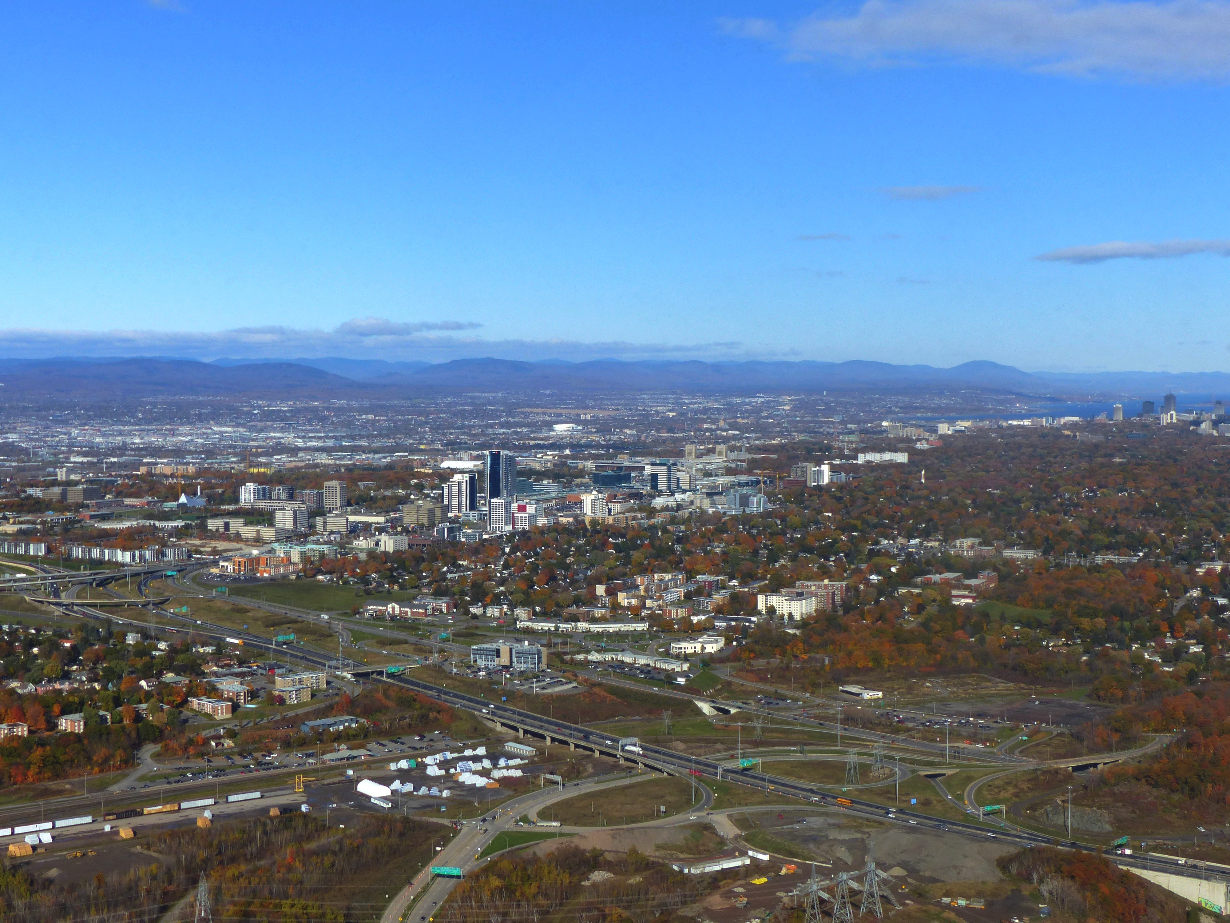 Québec City - Saint Louis